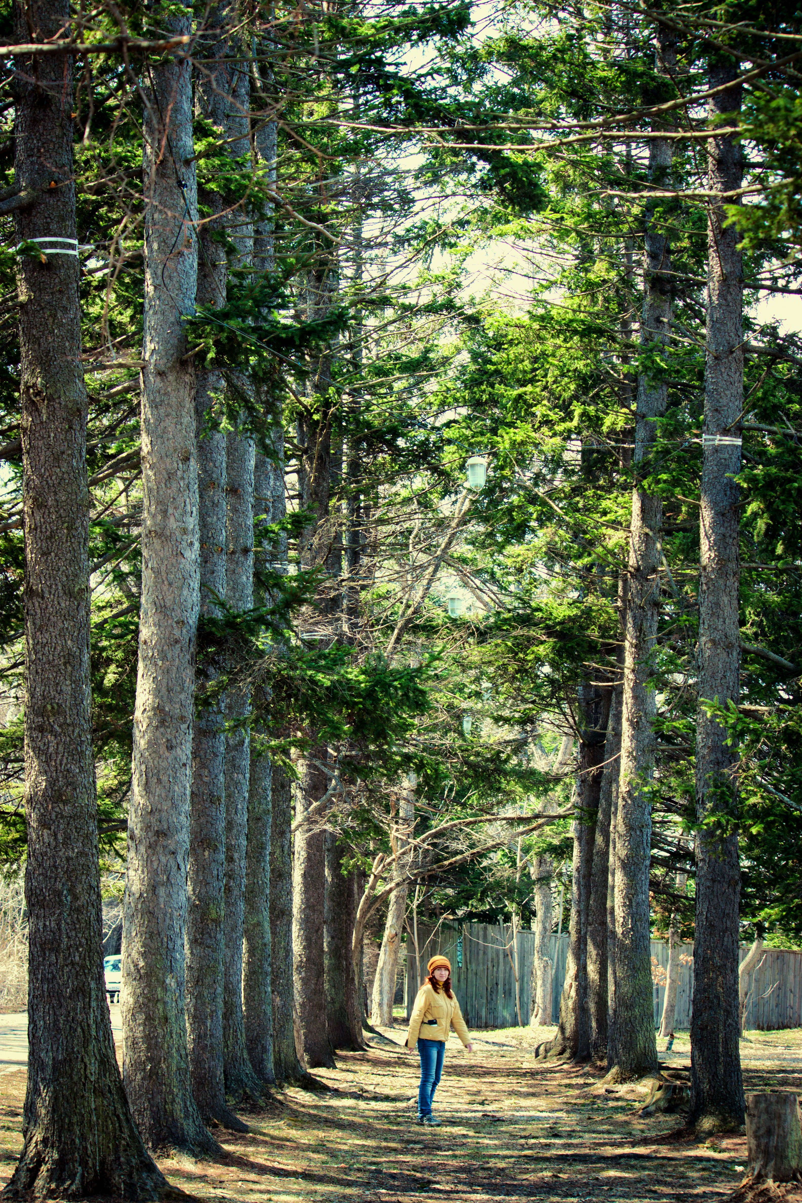 Садгород: Владивостокский городской округ, Приморский край This image is related to the protected area of Russia number 2510020